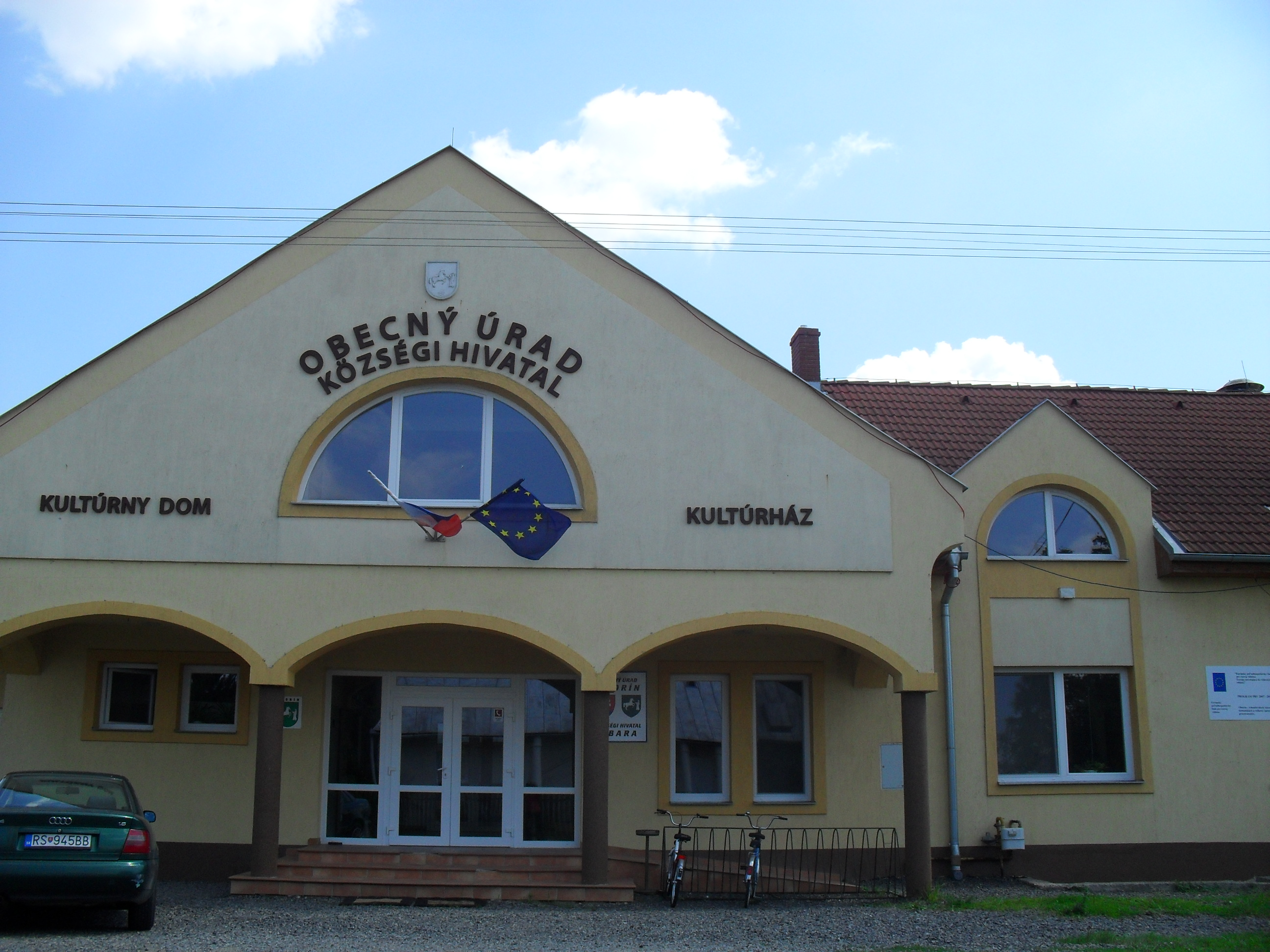 Abara - községi hivatal